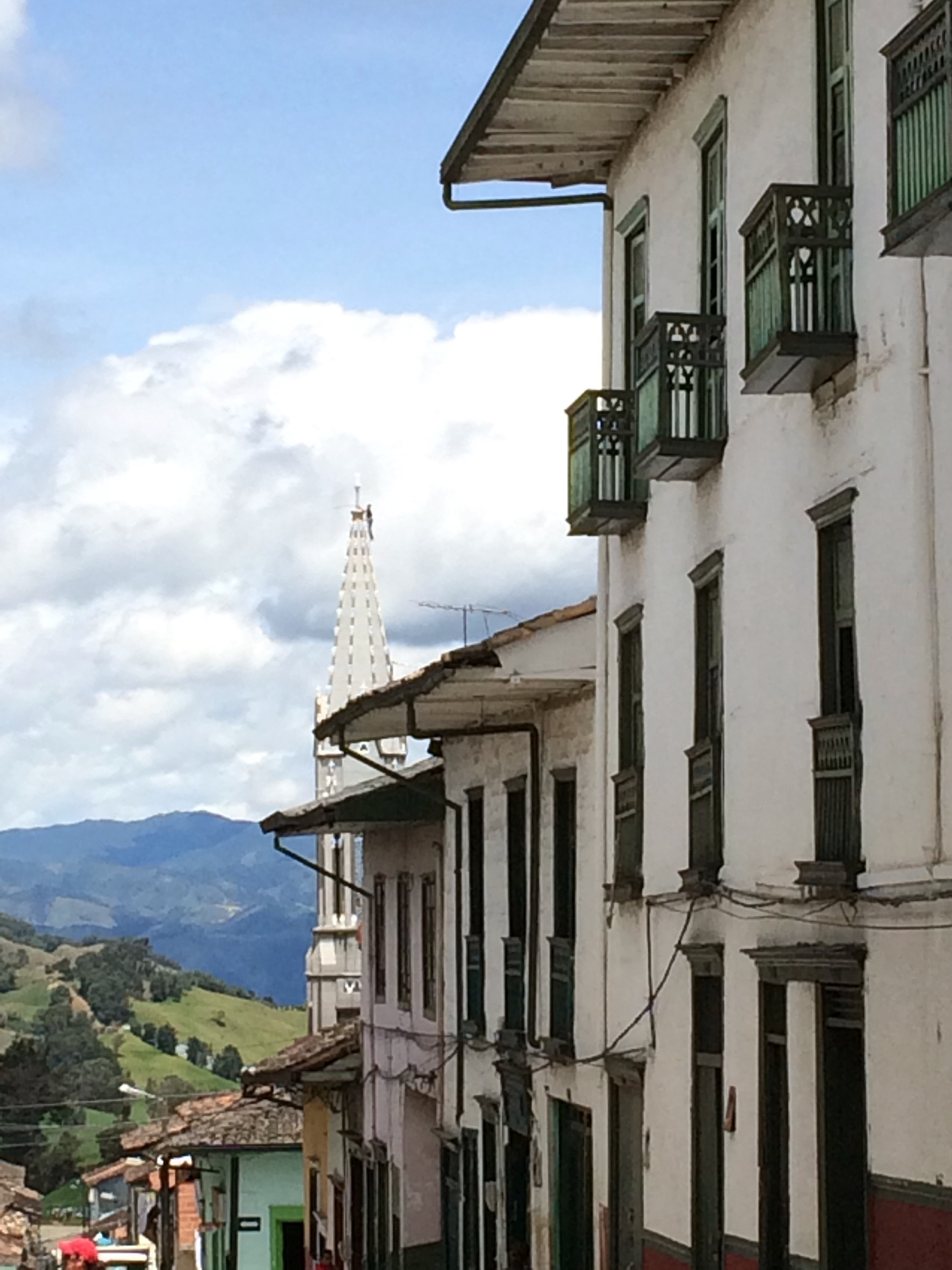 Aspecto del sur de la ciudad, vista desde la esquina de la carrera 6a. con calle 6a.